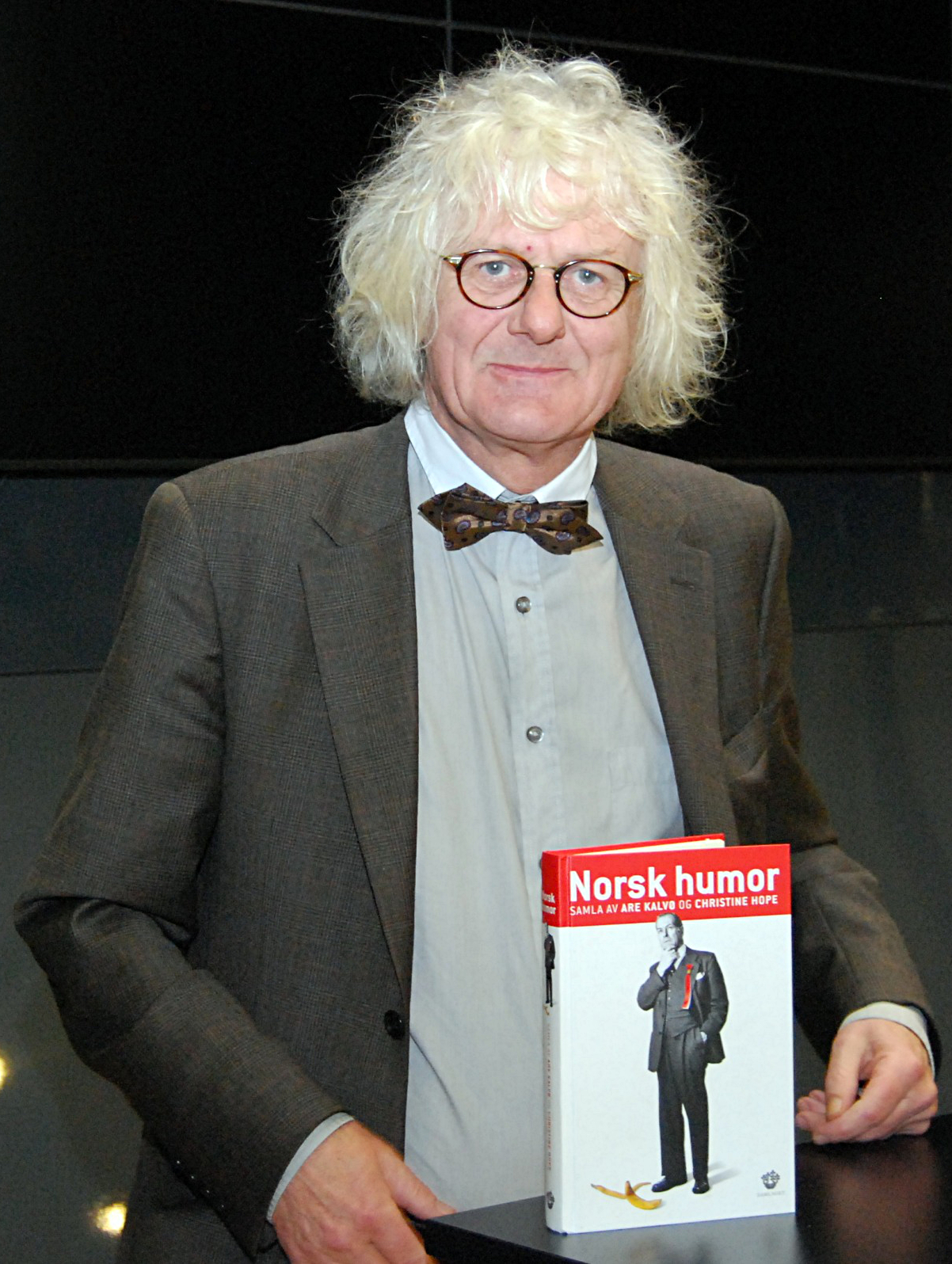 Per Inge Torkelsen fotografert under en tilstelning i forbindelse med "Læringsdagene 2010" i Aust-Agder.